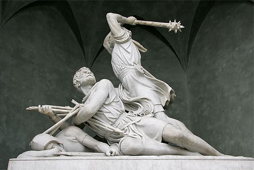 Stans: Arnold Winkelried-Denkmal von Ferdinand Schlöth beim Dorfplatz